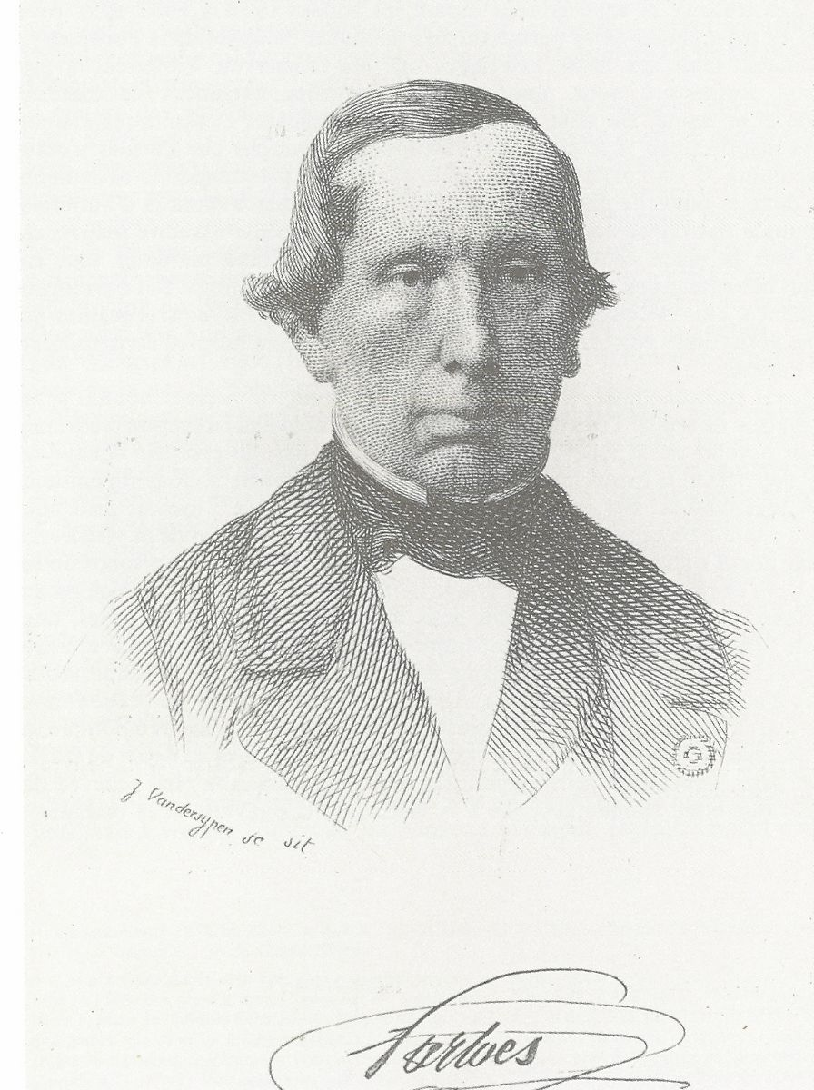 Portrait de l'architecte Henri Partoes